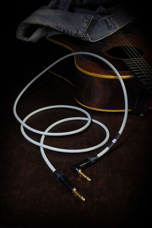 神鳴アコースティック・ケーブル